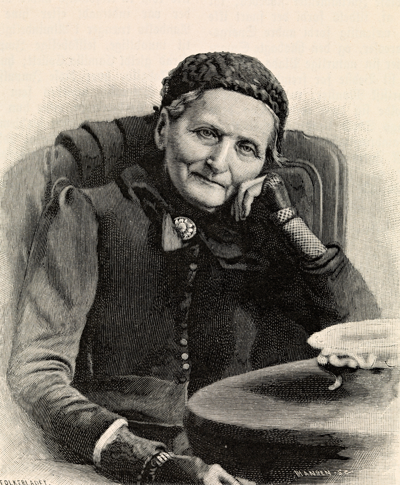 Tittel / Title: Portrett av Camilla Collett, 1893 Motiv / Motif: Xylografi etter fotografi tatt av Robert Collett i 1893. Xylografiet har stått på trykk i Folkebladet. Dato / Date: 1893 Fotograf / Photographer: Robert Collett (1842-1913) Xylograf: Hansen Eier / Owner Institution: Nasjonalbiblioteket / National Library of Norway Lenke / Link: Bildesignatur / Image Number: blds_04515